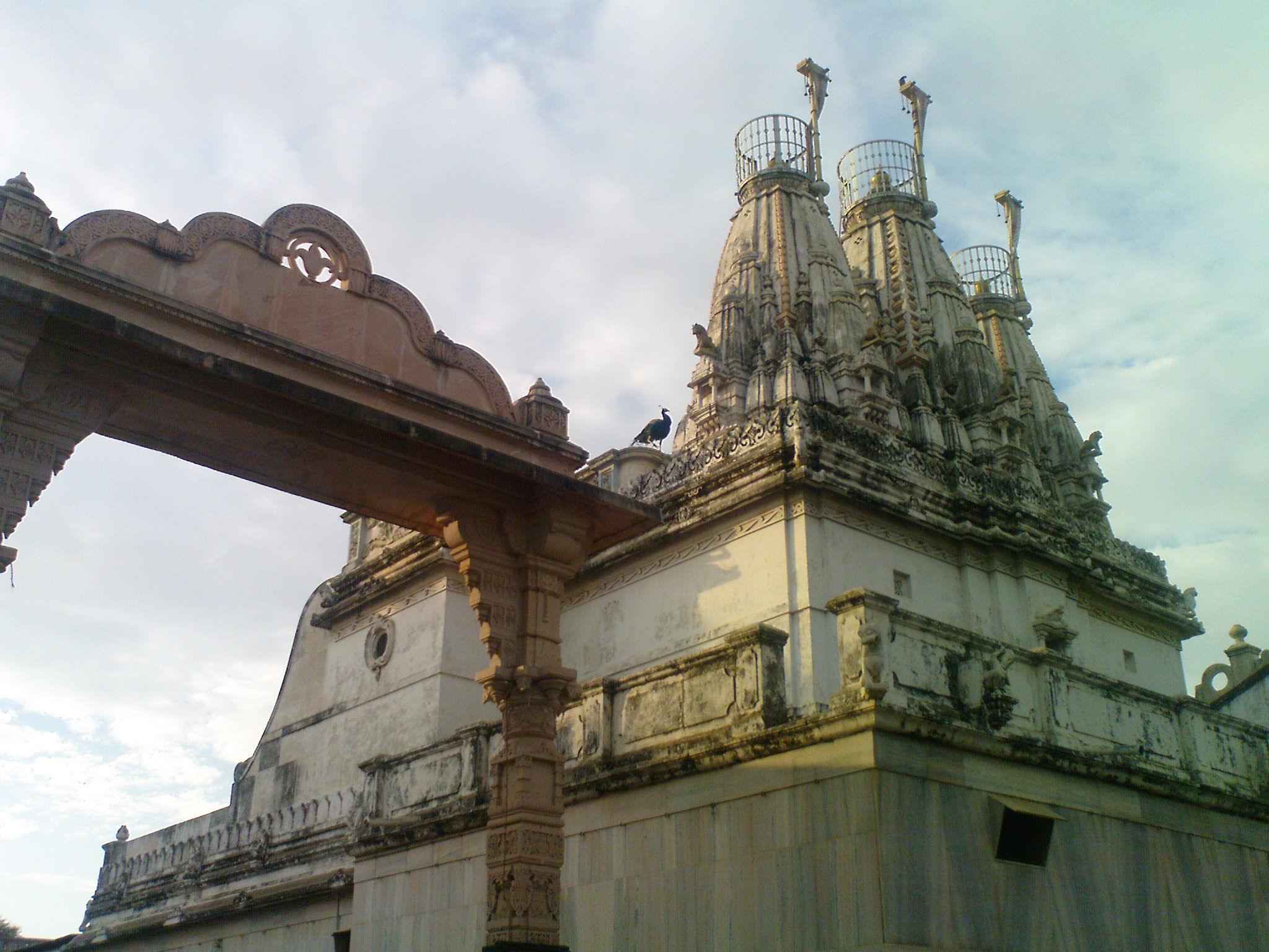 A Jain Temple in Mehsana, Gujarat, India. Evening time.